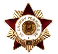 PMR state order